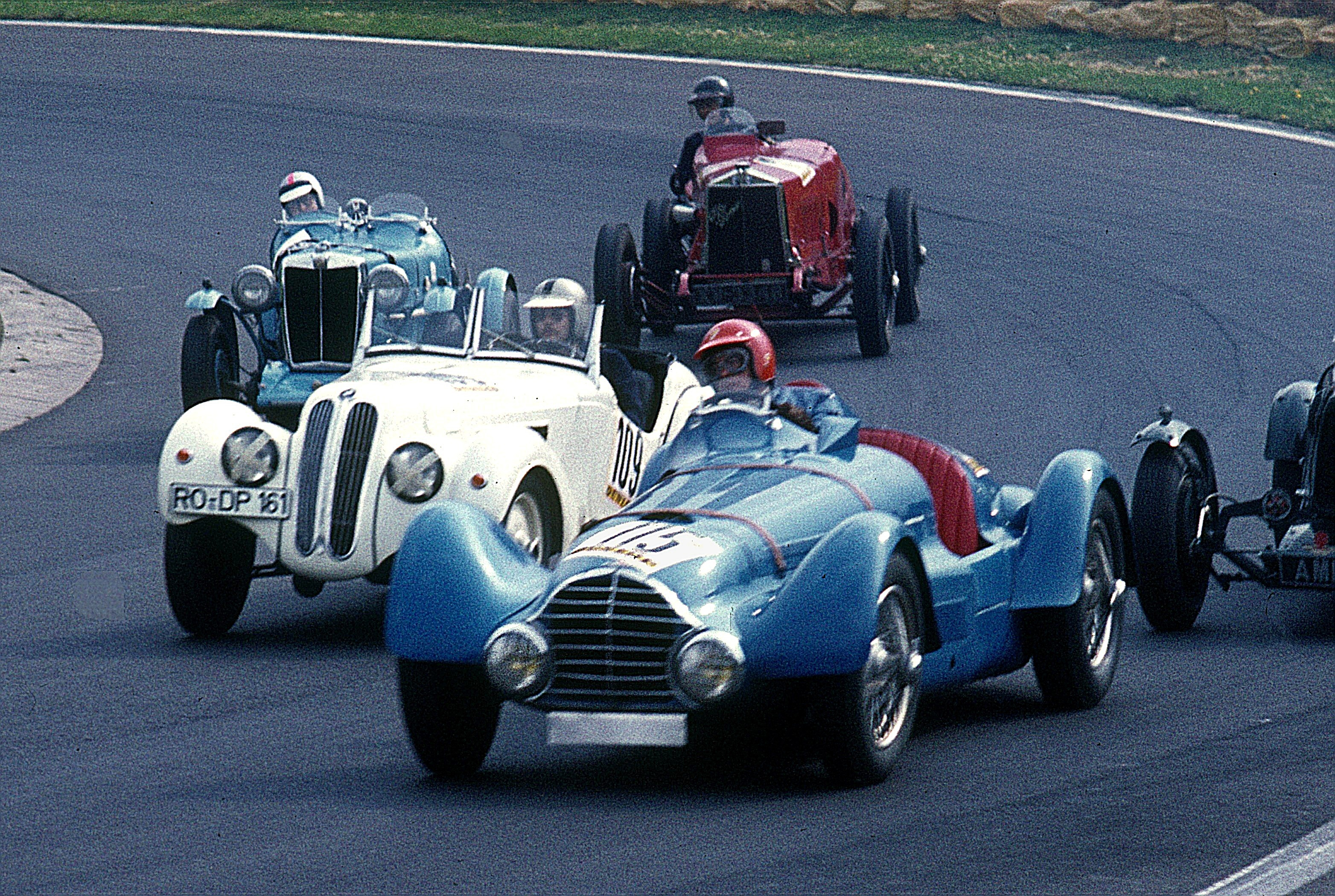 Delahaye 135 MS (Nr. 115), Fahrer: Dries van der Lof